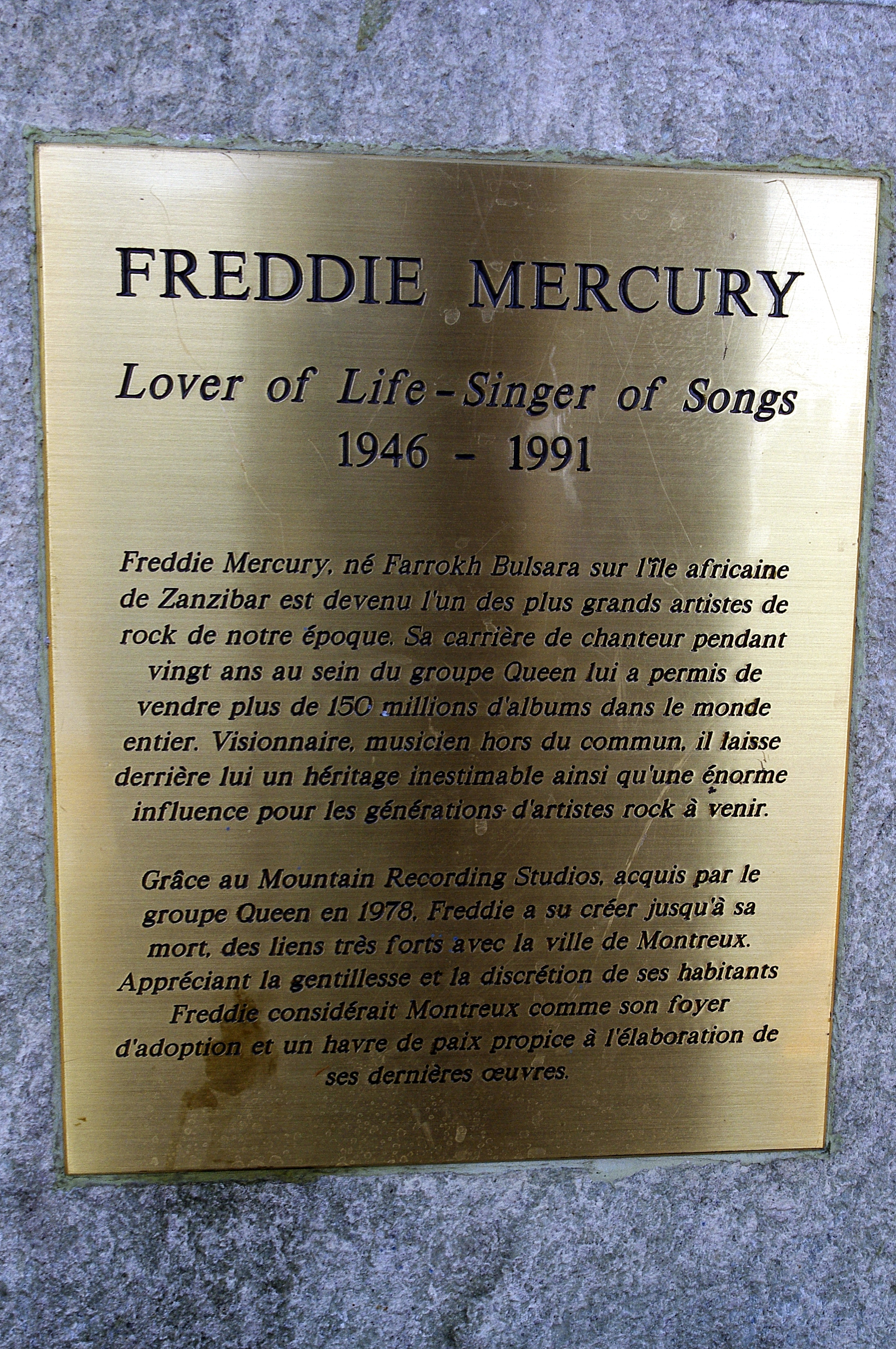 Hommage à Freddie Mercury. Plaque sous sa statue à Montreux